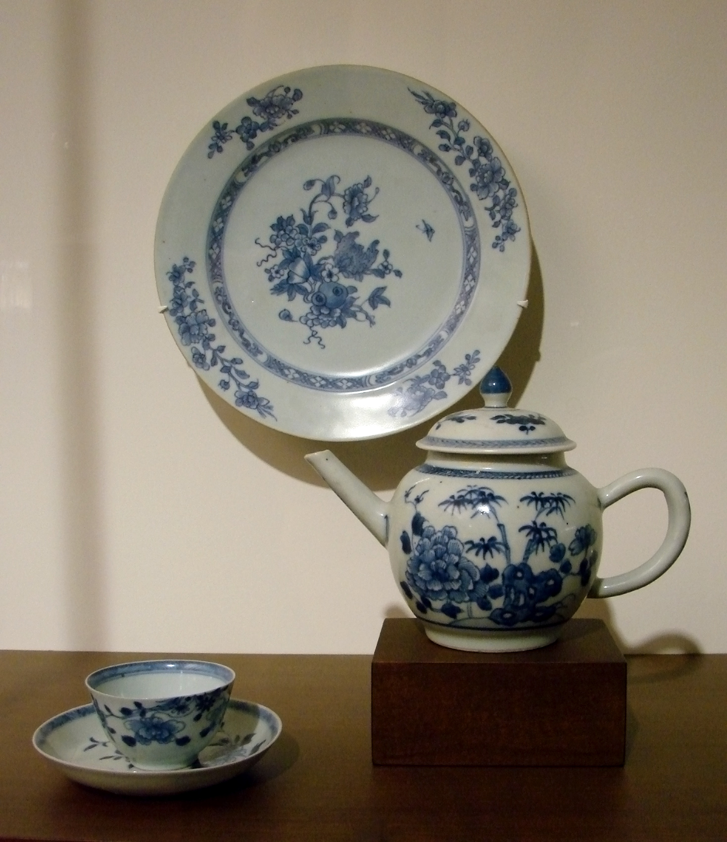 Porcelaine chinoise destinée à l'exportation vers l'Europe et retrouvée dans la cargaison d'une épave; 18ème siècle. Musée Guimet, Paris.